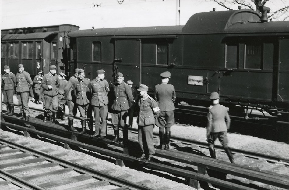 Saksalaisia sotilaita Järvsön rautatieasemalla Ruotsissa 15.4.1943